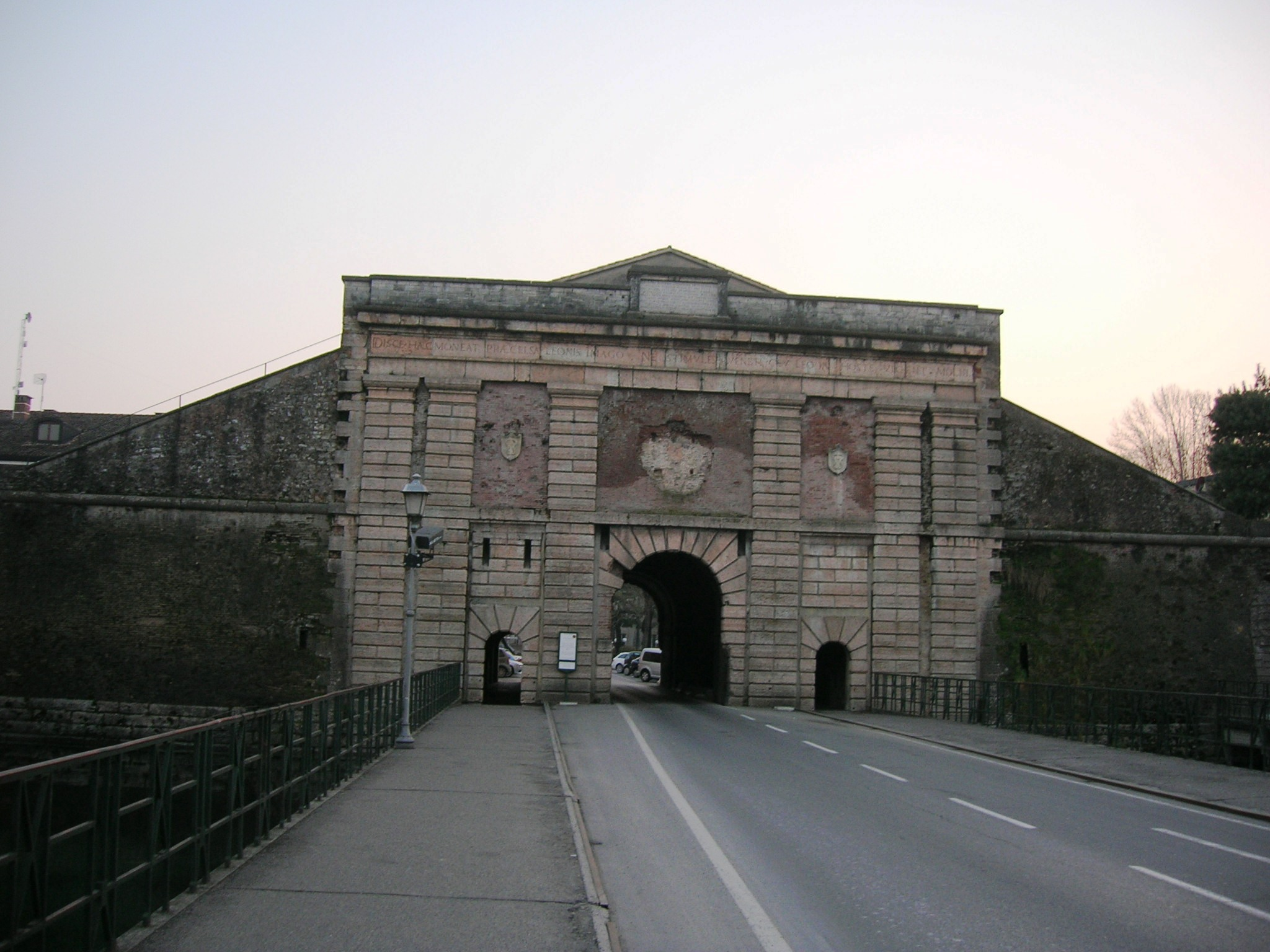 Porta Verona